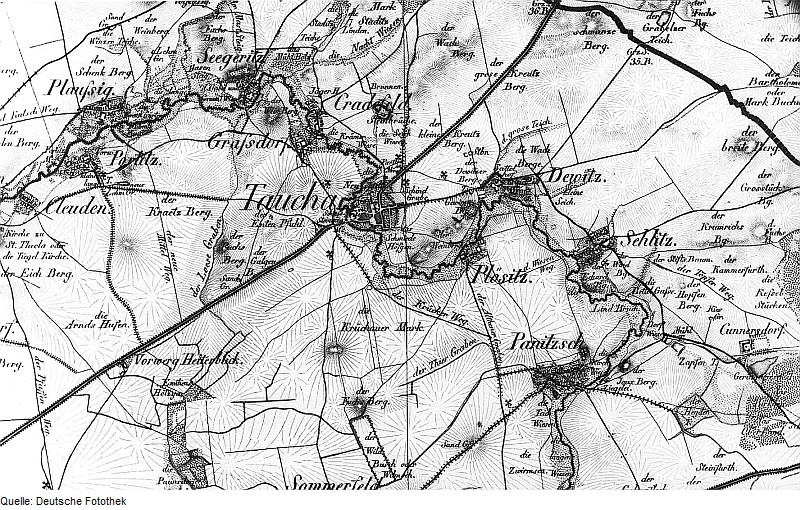 Original image description from the Deutsche Fotothek Oberreit, Sect. Leipzig, 1836/39